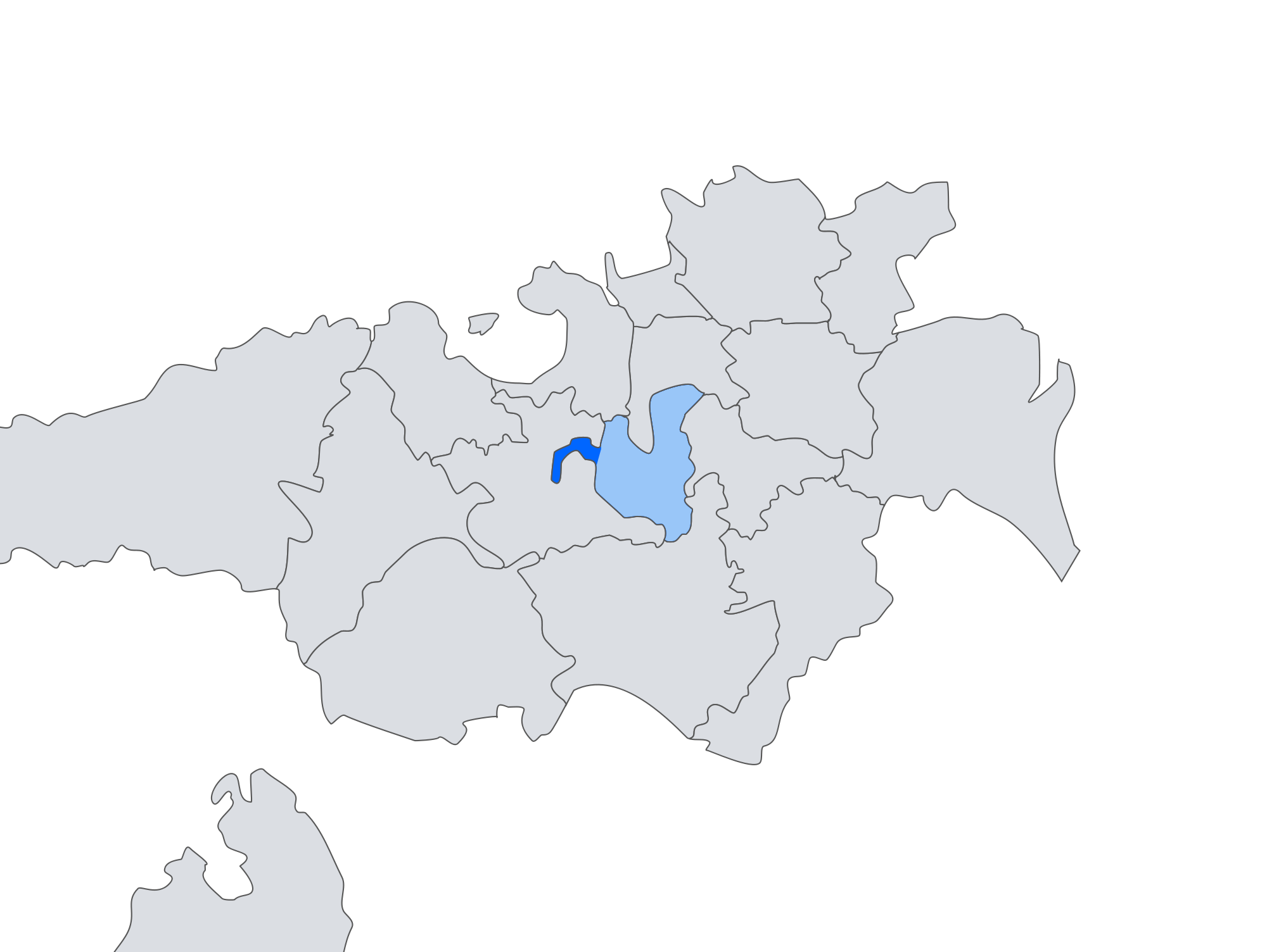 Zona de Morlans en el barrio de Amara Berri